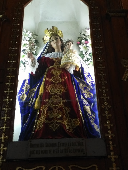 Virgen del Socorro venerada en la Parroquia San Felipe, León, Nicaragua.